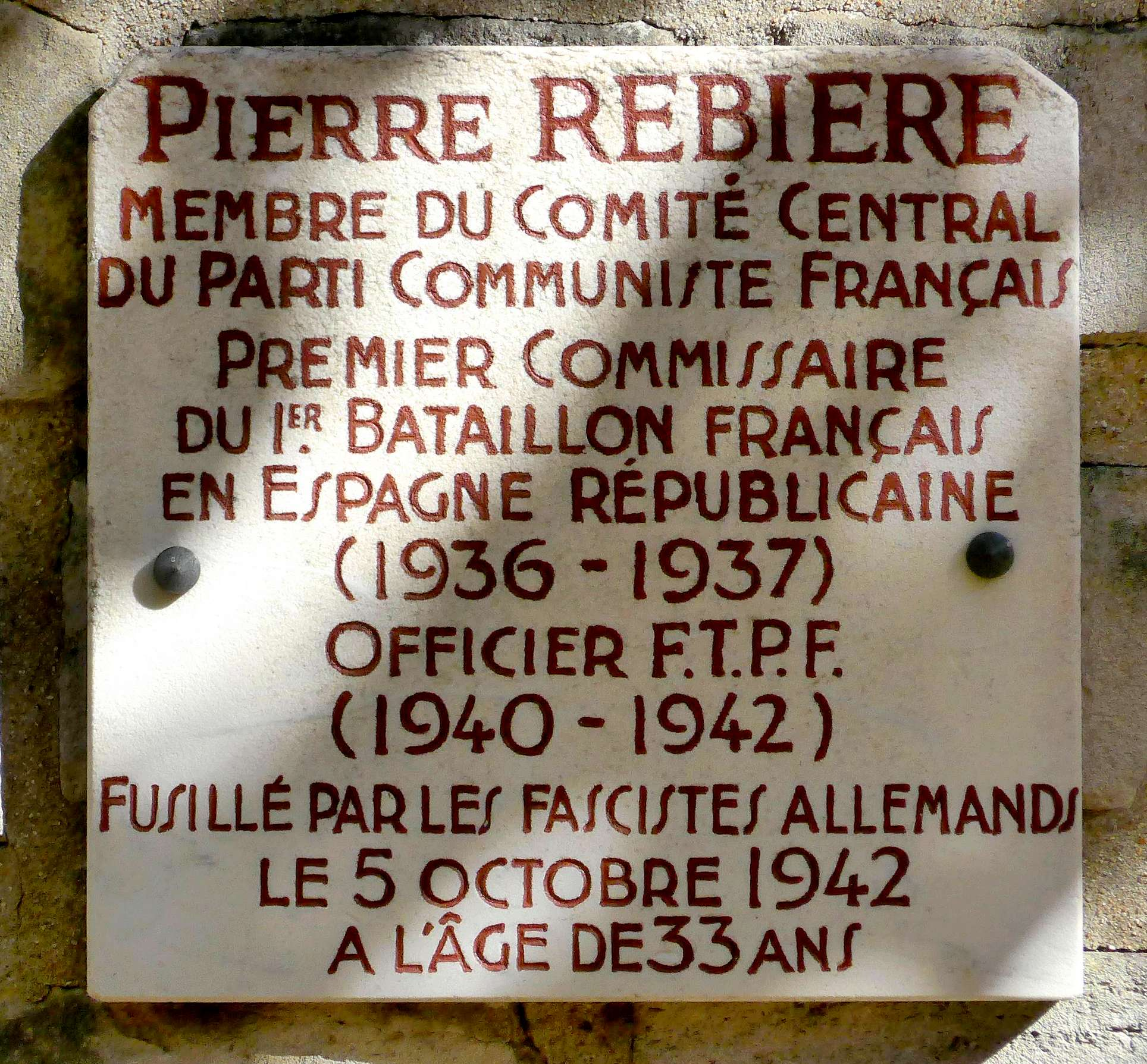 Plaque au nom de Pierre REBIERE apposée sur le mur du cimetière parisien d'Ivry, dans le carré des fusillés.